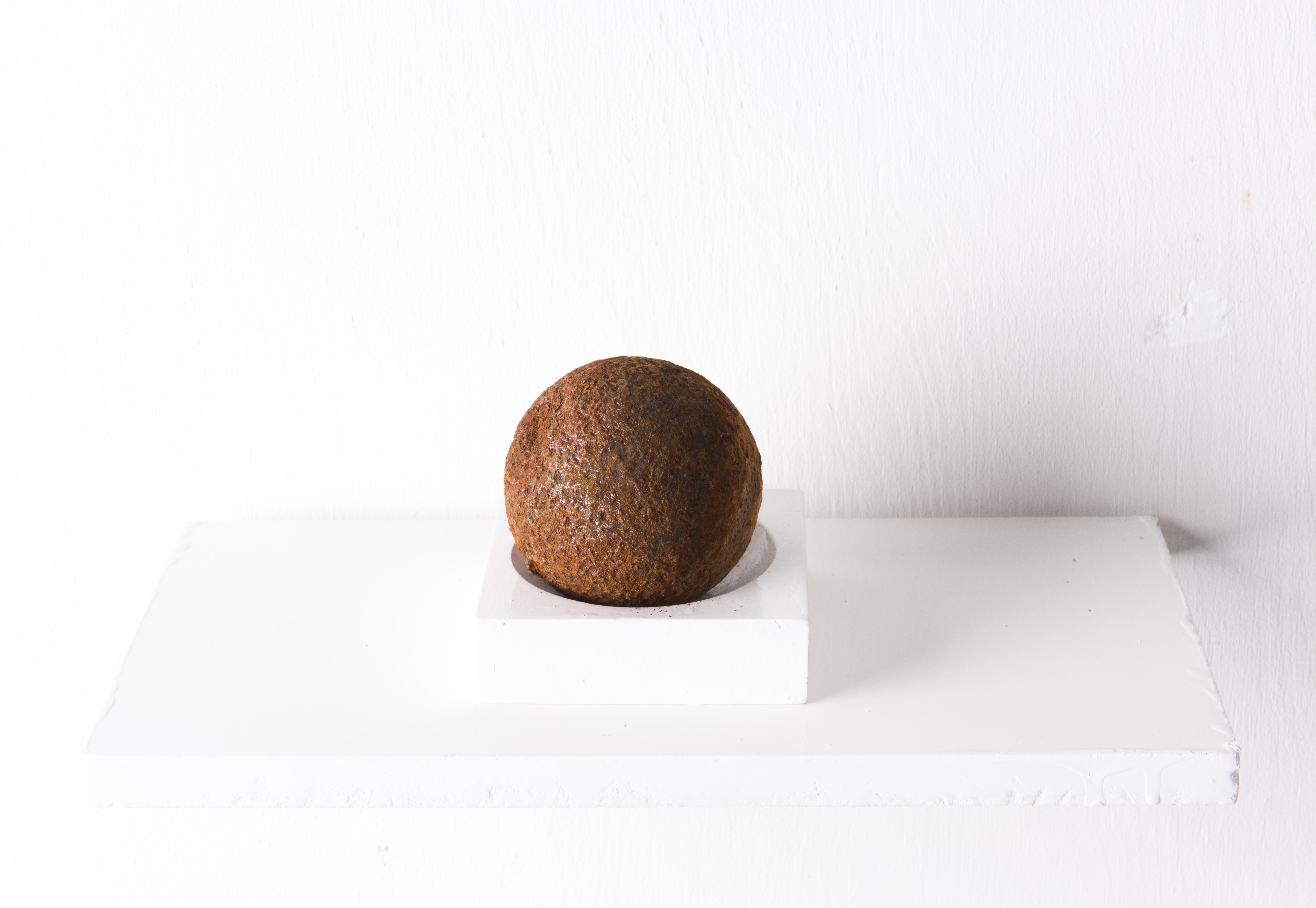 «Rusty Beauty V». Installasjon av den norske kunsteren Beate Gjersvold. ""Rustne gjenstander på vakkert underlag. Gjenstander som er på vei tilbake til naturen""